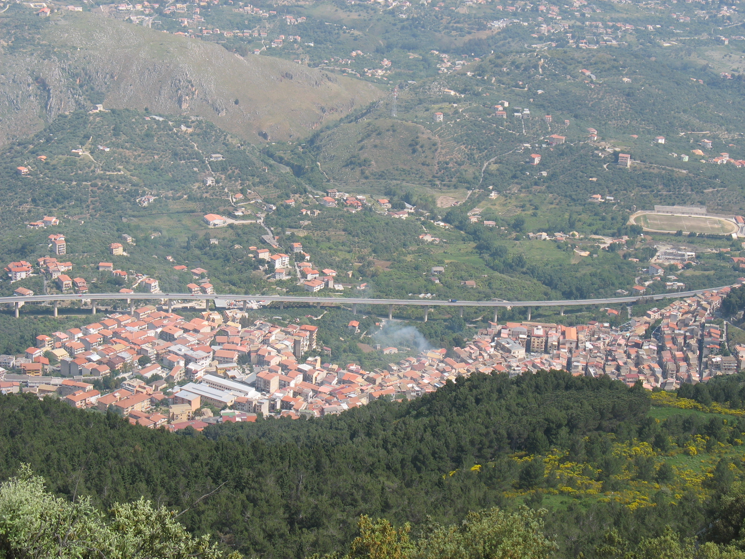 Alessiox.94, Immagine propria, Altofonte visto dalla Moharda.